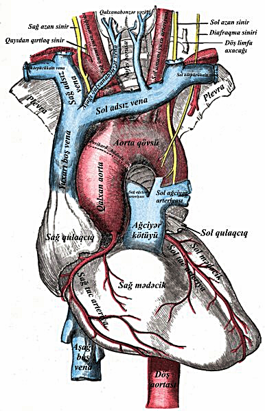 Ürək və magistral damarlar